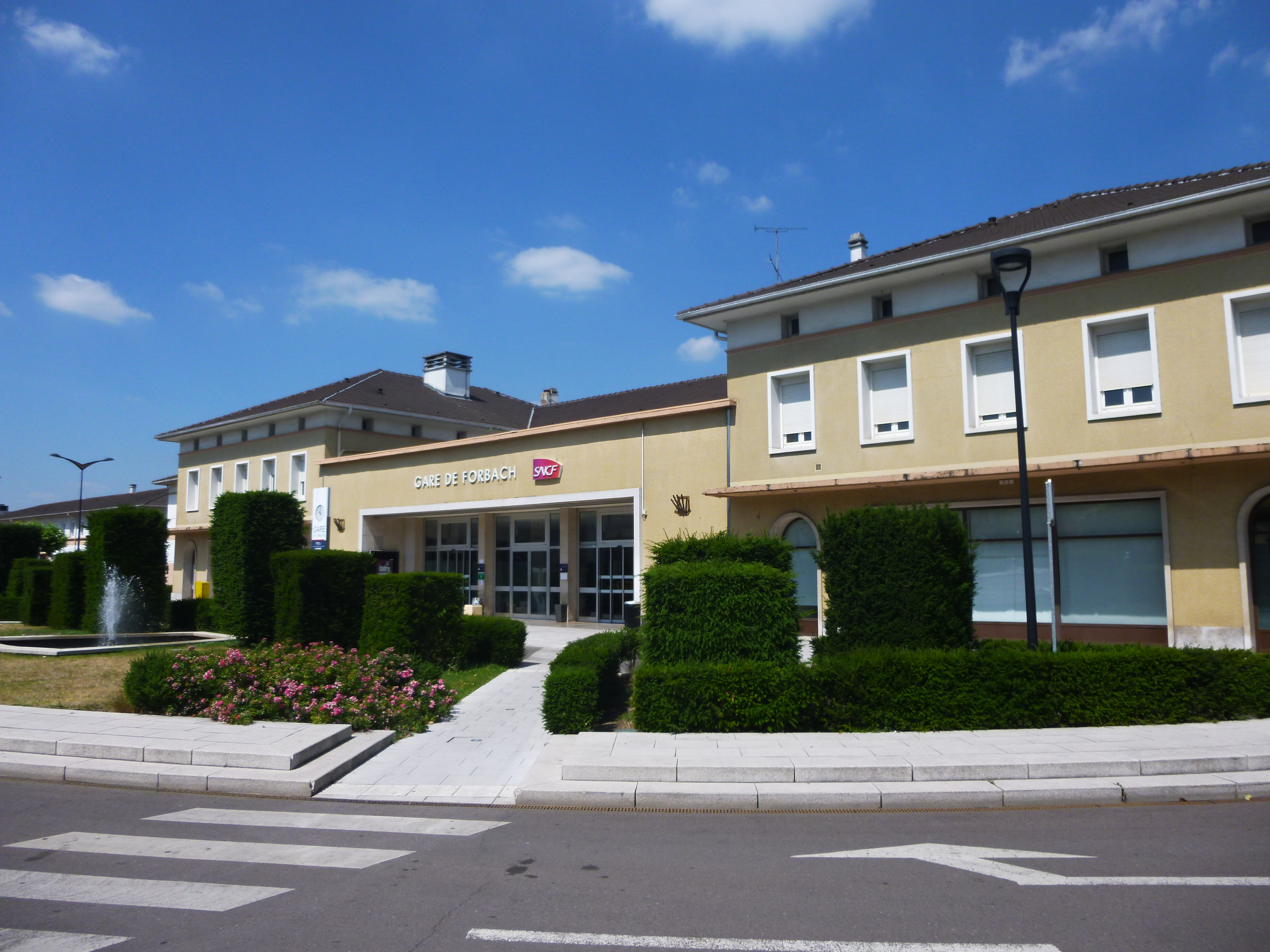 gare de Forbach, le 22/06/2014